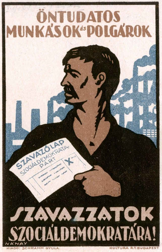 MSZDP szórólap 1922-ből. Készítője: Dédes Gyula; Schramm (Győr, 1882. márc. 1. – Bp., 1975. máj. 8.): könyvkötősegéd, pártmunkás. Készült a Kultura Rt. nyomdájában, Budapesten